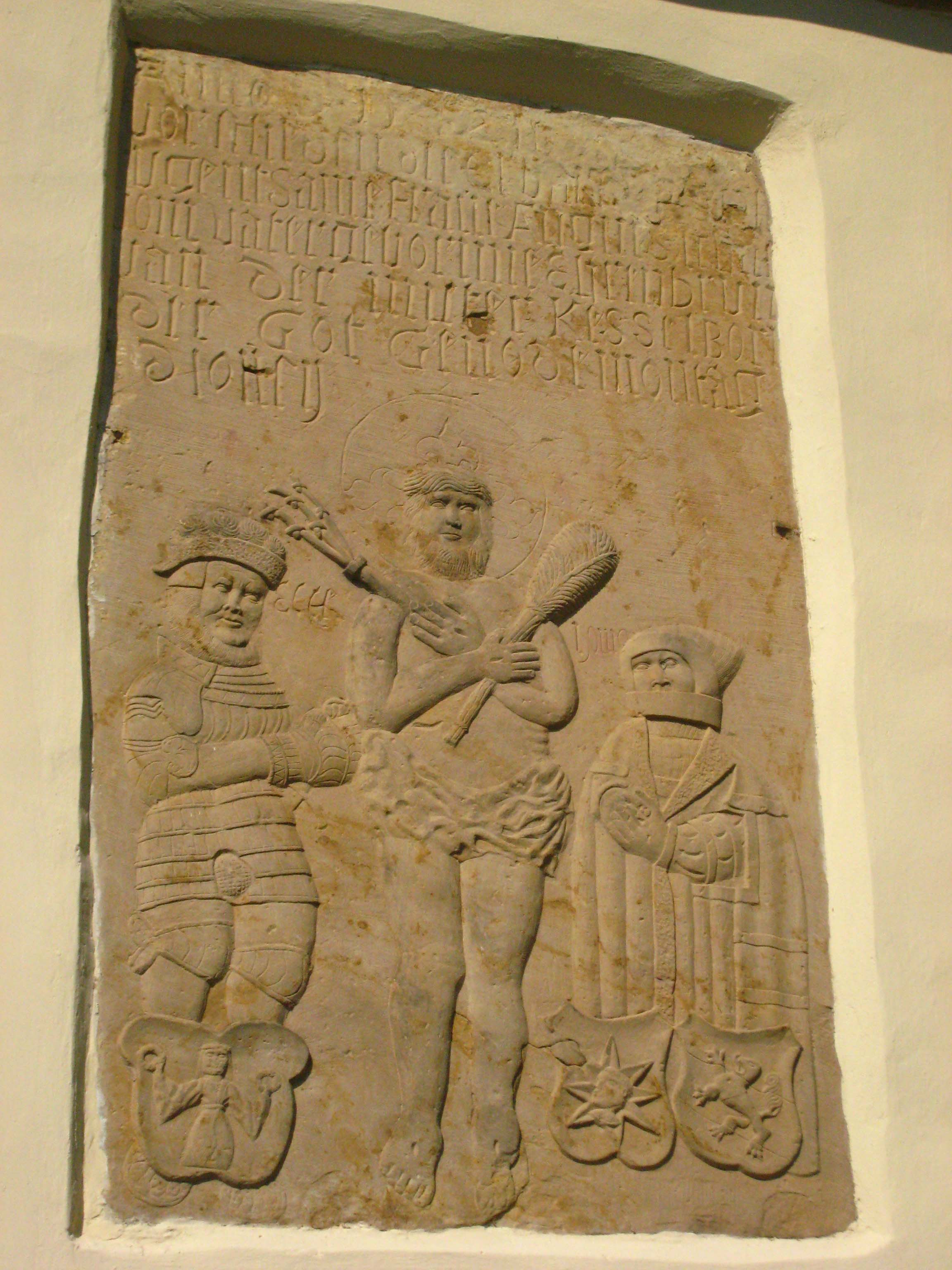 Sandsteintafel mit Darstellung der Stifter Asmus Schade und Agnes Brun anlässlich deren Eheschließung im Jahre 1542